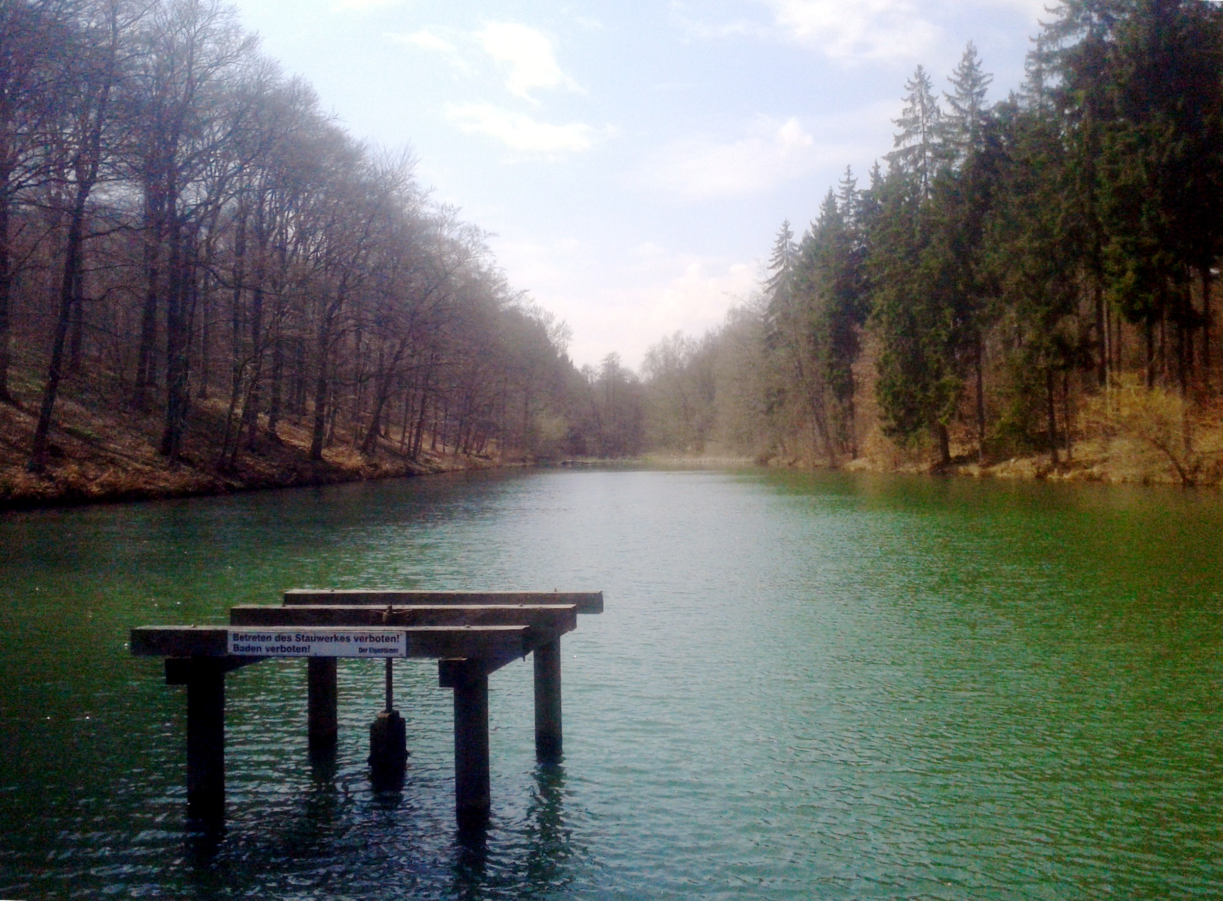 Der Grenzteich im Unterharzer Grenztal. Durch den Teich (nahe dem linksseitigen Ufer) läuft die Gemarkungsgrenze zwischen Neudorf, ehemals Fürstentum Anhalt-Bernburg, und Dankerode, ehemals Herrschaft Falkenstein (Grafen von der Asseburg-Falkenstein). Durch letztere wurde der Teich für den anhaltischen Bergbau errichtet. Blick über den Teich mit Striegelgerüst im Vordergrund